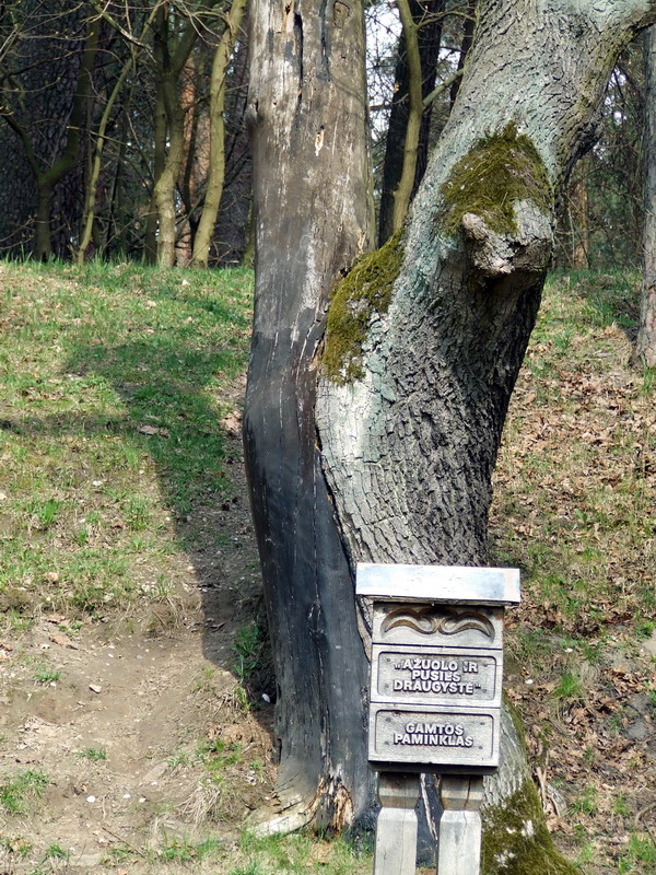 Gamtos paminklas Panemunės šile - "Ąžuolo ir pušies draugstė".